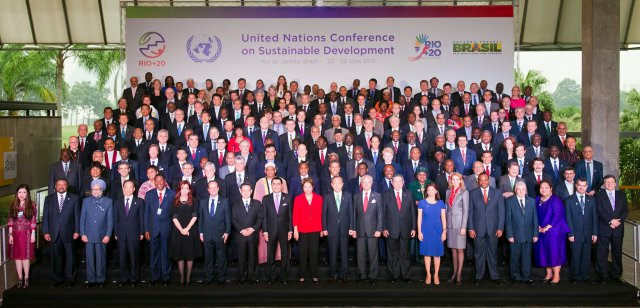 Foto de familia